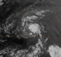 Tormenta Tropical Dennis (1993)